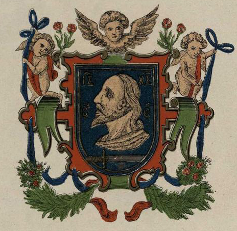 Беларуская (тарашкевіца): Віцебск (Viciebsk). Мескі герб